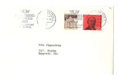 Echt gelaufene Komplettfälschung einer Briefmarke, die dem Geburtstag Lenins gewidmet ist. Zusätzlich mit einer echten Briefmarke frankiert.